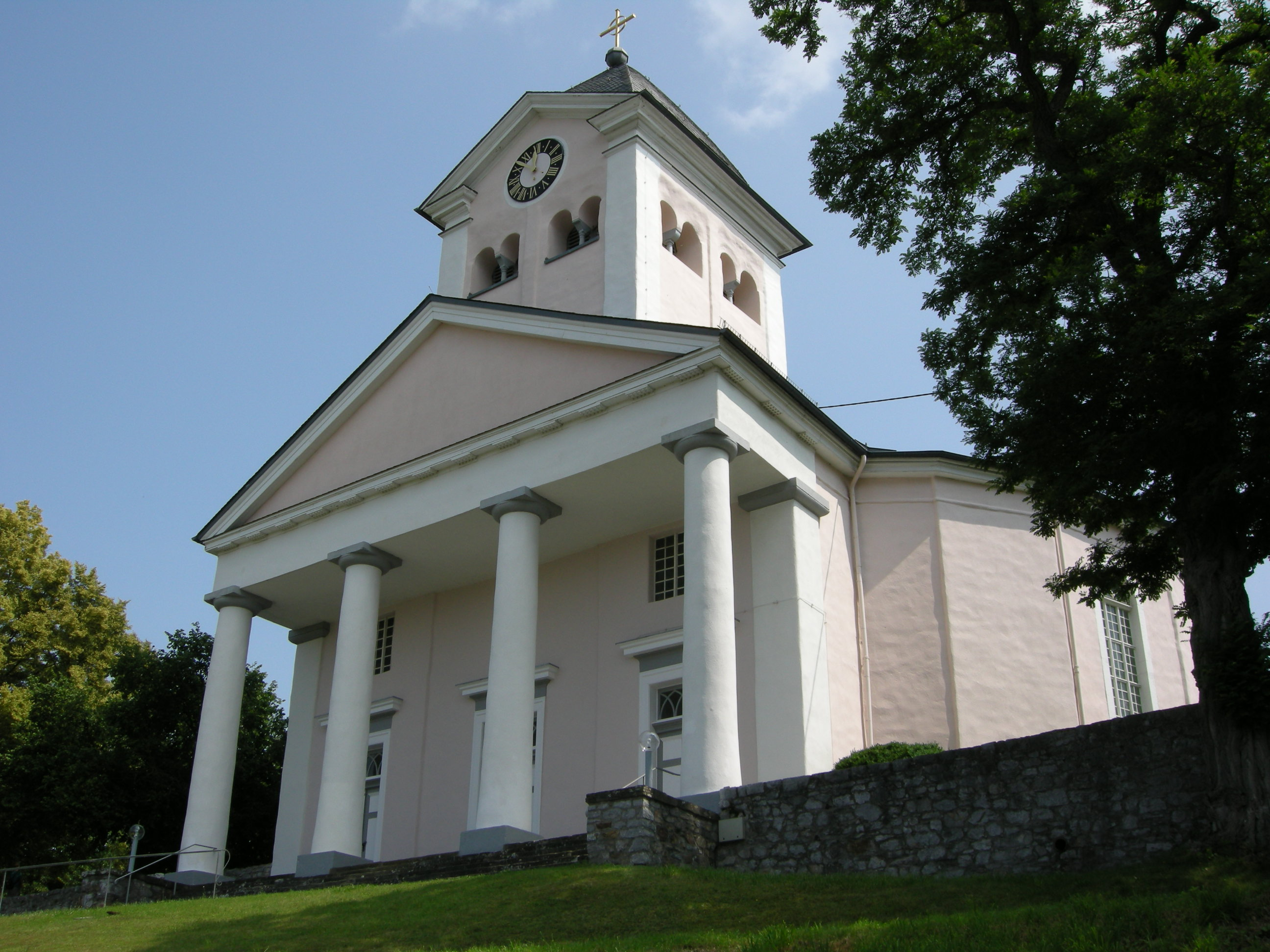 Ev. Kirche Oberneisen Friedrich Ludwig Schrumpf 1816-19